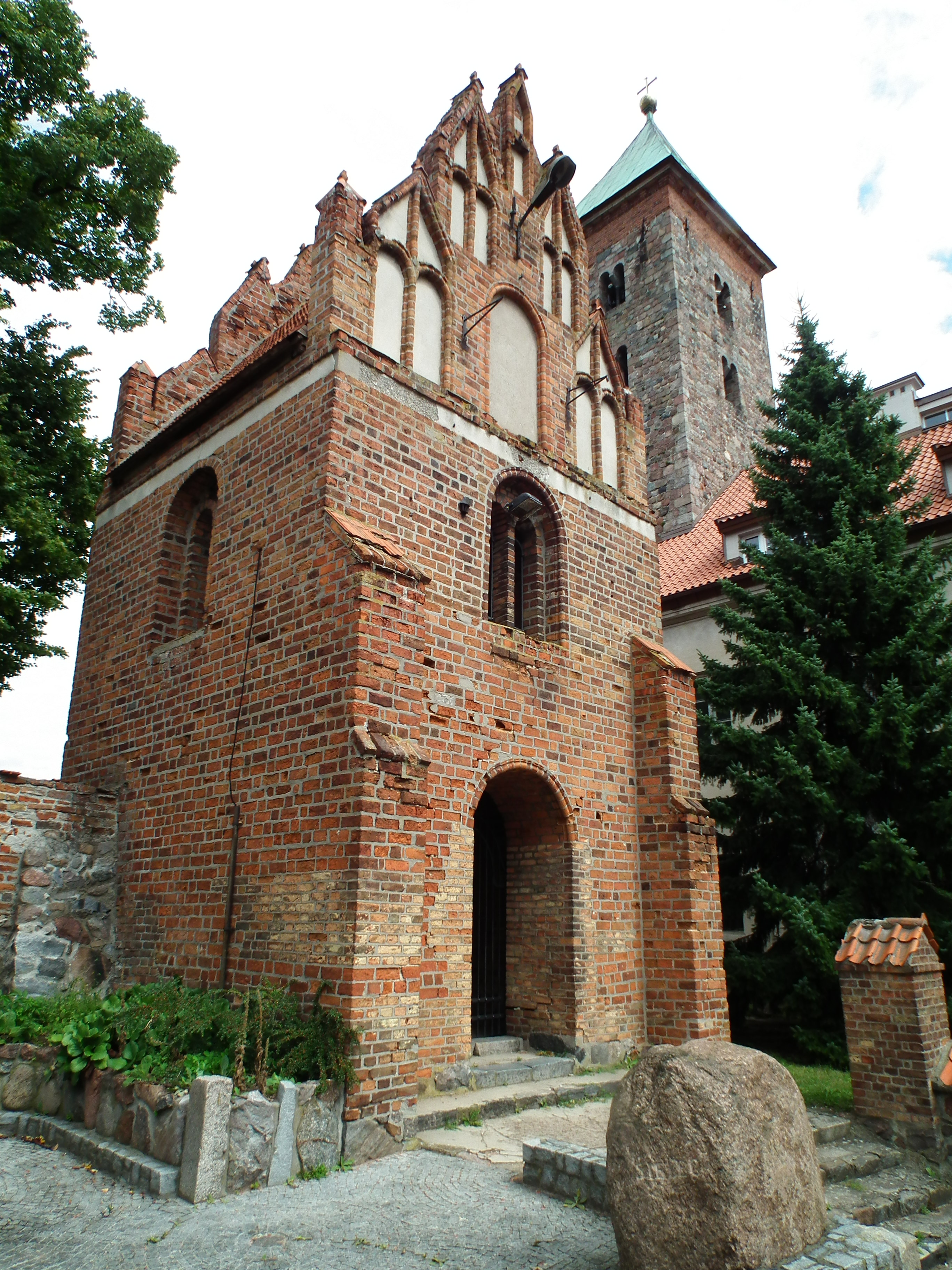 Kolegiata w Czerwińsku n/W, Brama Opata Kuli.